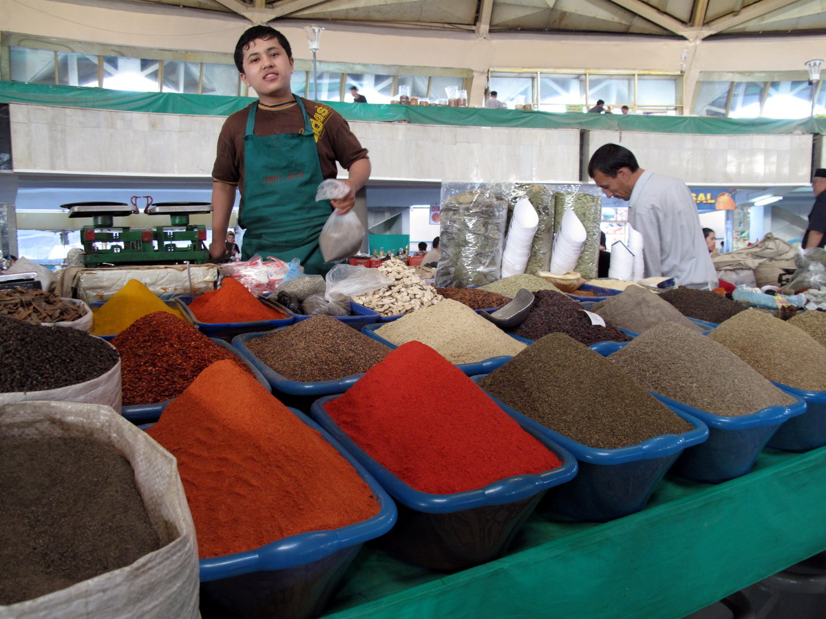 Spices